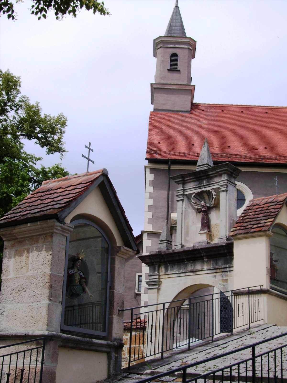 Hechingen, Germany